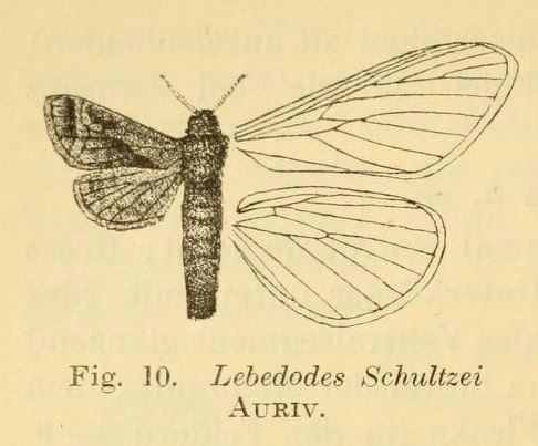 Paralebedella schultzei